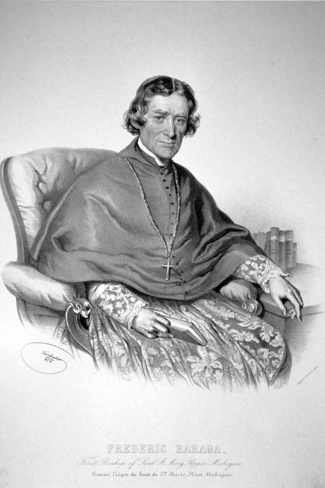 Friedrich Baraga /1797-1868), slowenischer Missionar, erster Bischof von Ober-Michigan. Lithographie von Josef Kriehuber, 1854